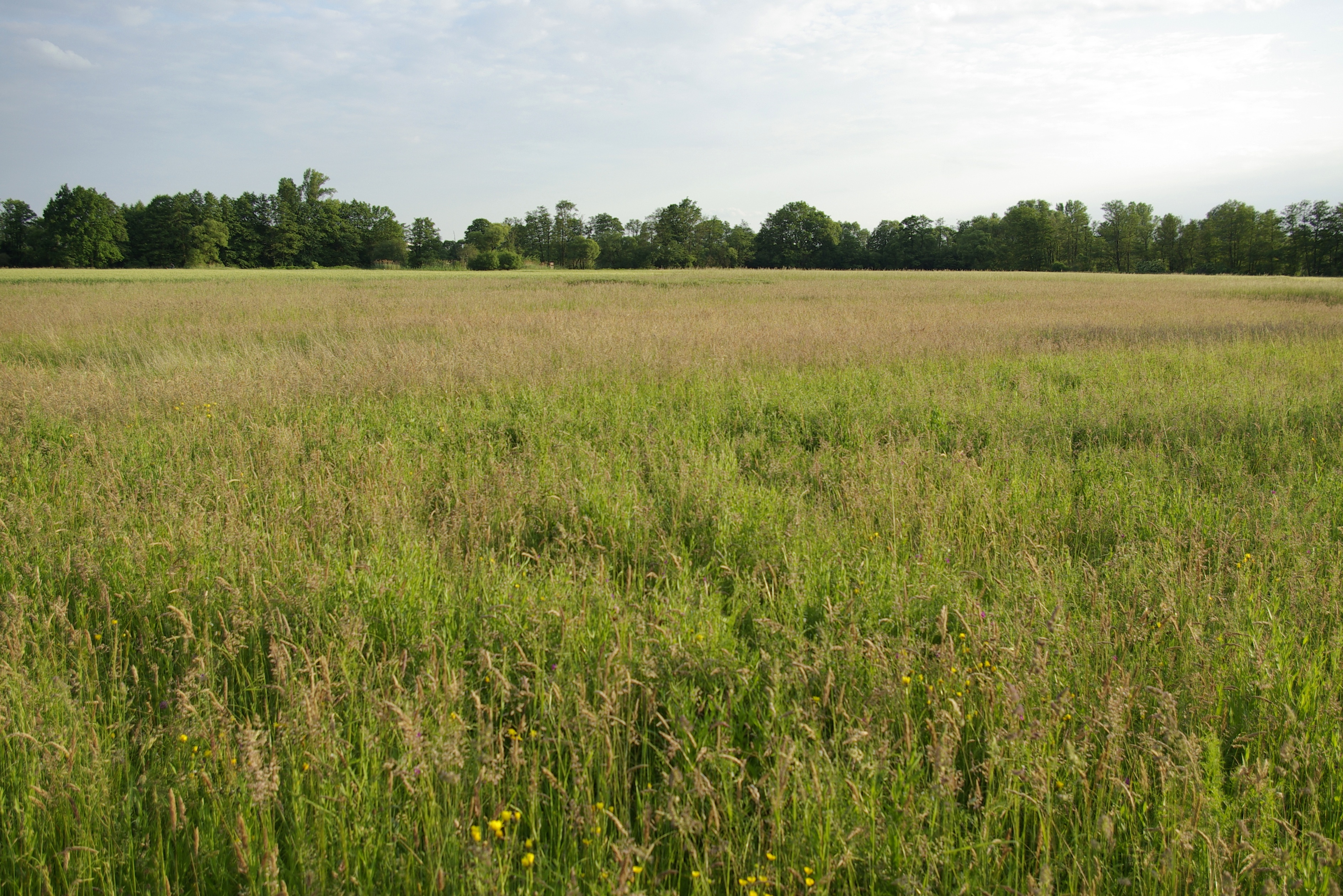 Feuchtwiese im Landschaftsschutzgebiet Gründlachtal - Ost nordwestlich des Nürnberger Stadtteils Neunhof.